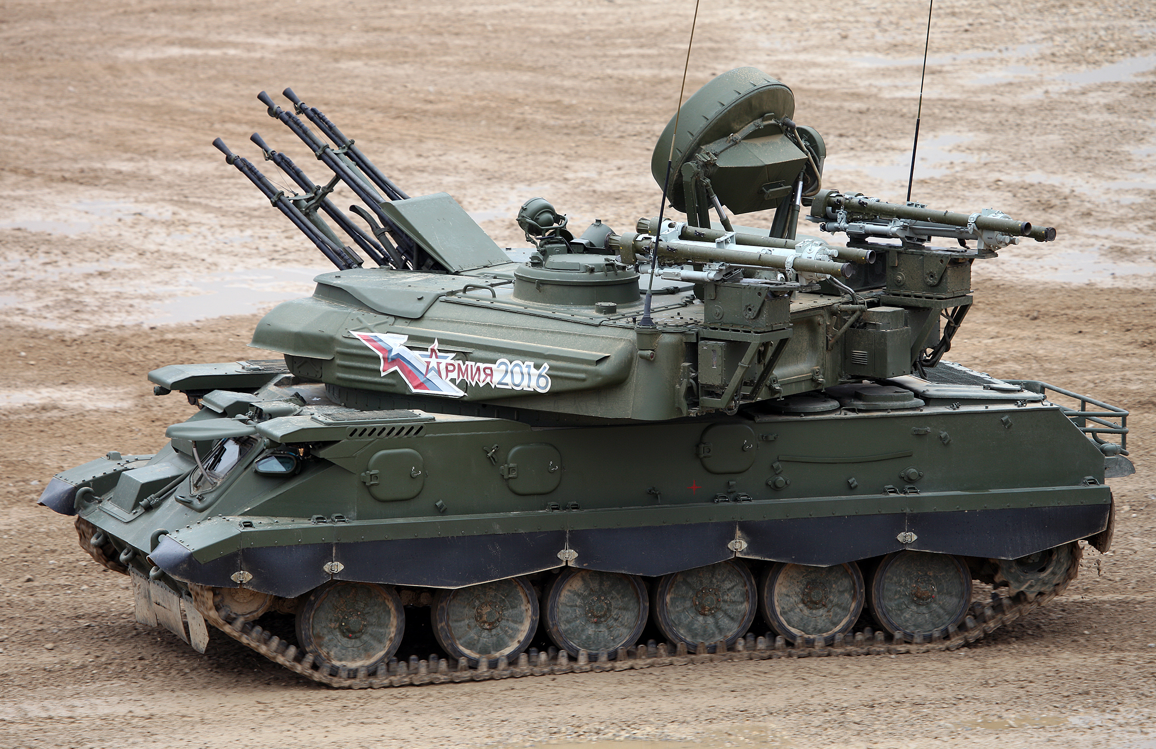 ЗСУ-23-4М4 Шилка-М4 (ZSU-23-4M4 Shilka-M4)